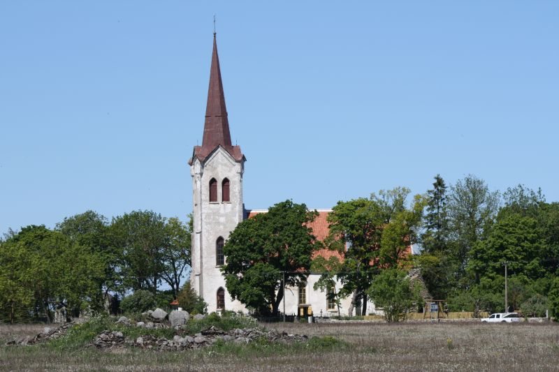 Jõelähtme kirik Tallinn–Narva maantee poolt vaadates.